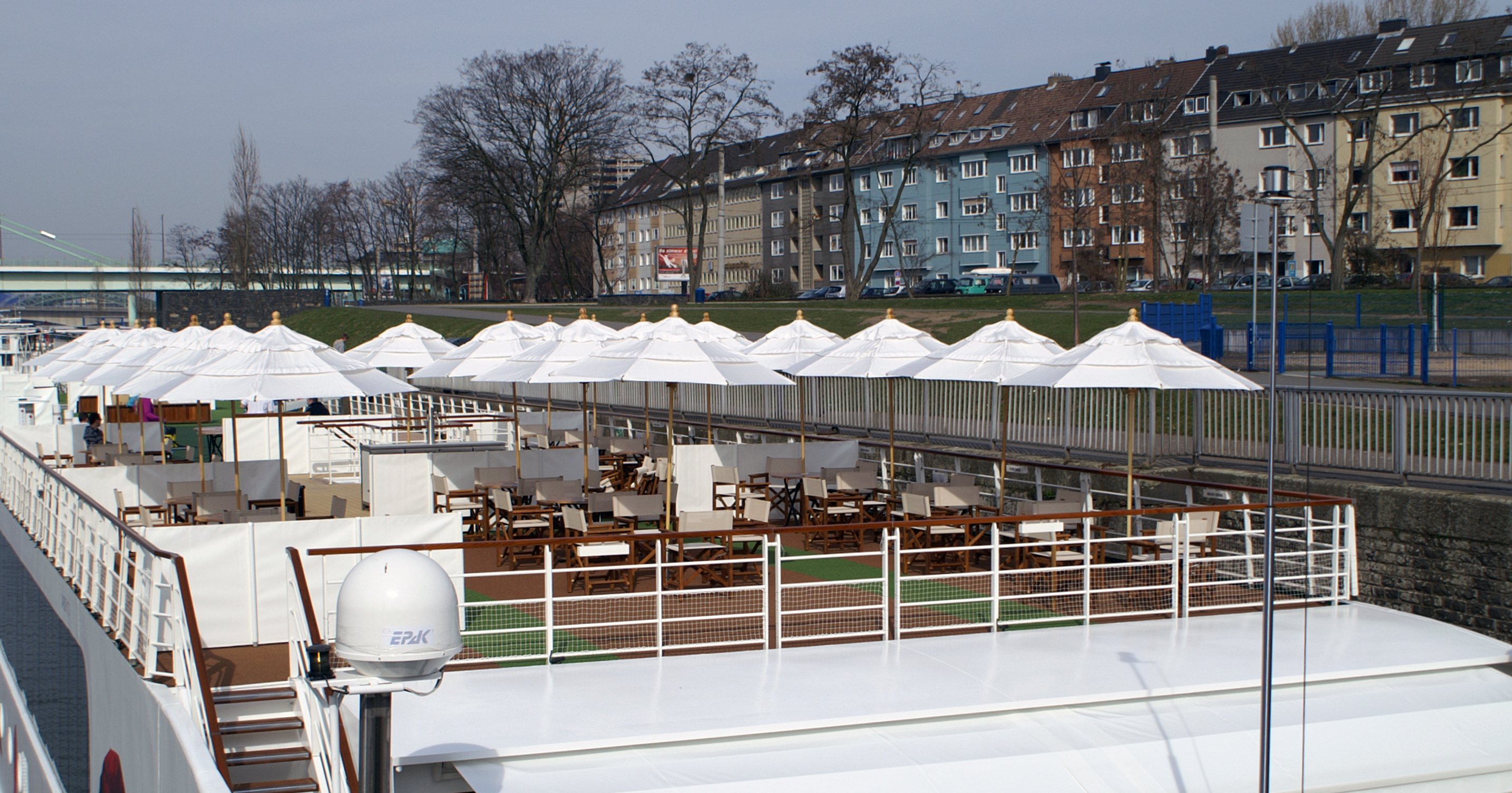 Der Restaurantbereich auf dem Freideck des Flusskreuzfahrtschiffs A-Rosa Brava.